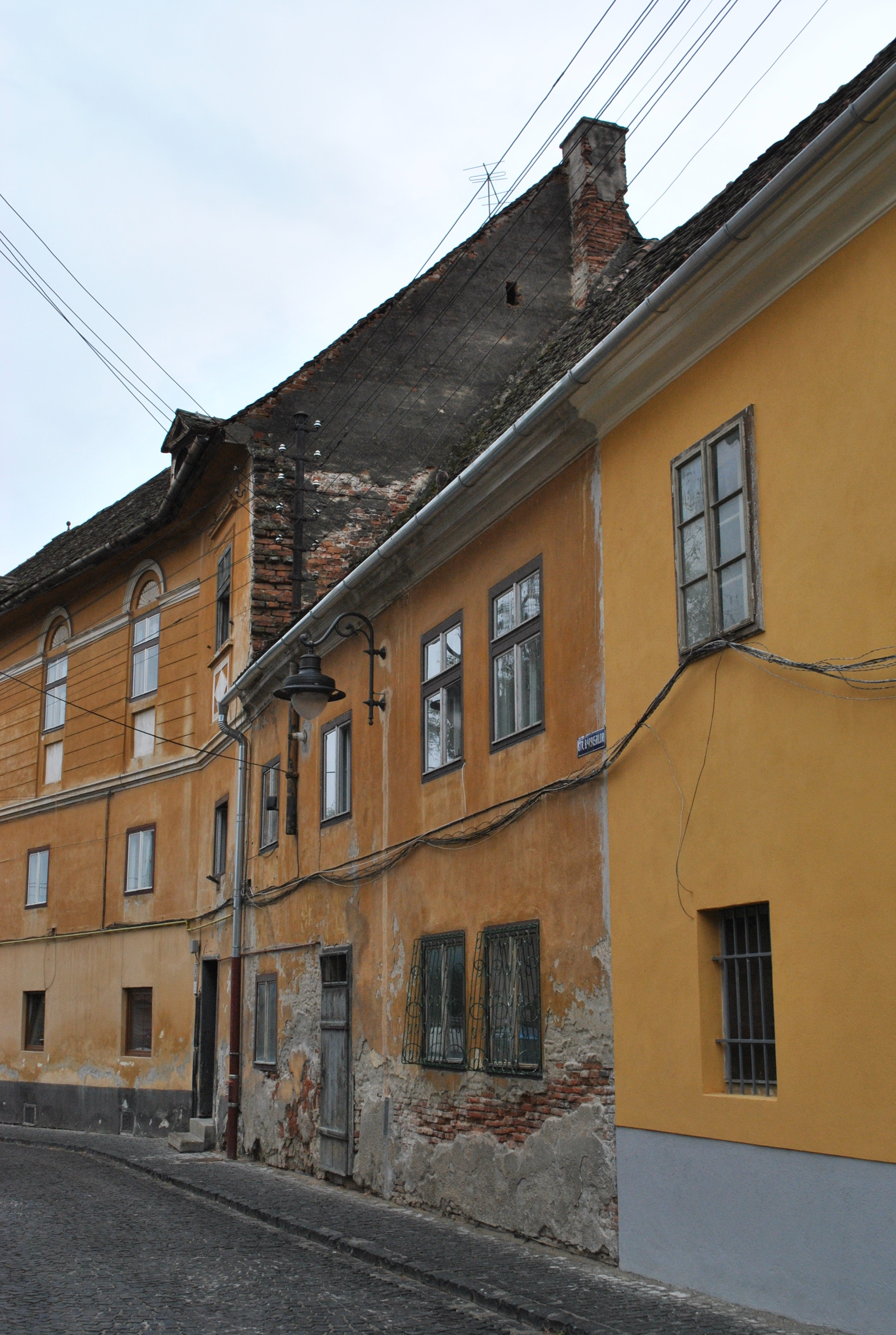 Claustru, azi locuințe, sec. XV - XVIII 02